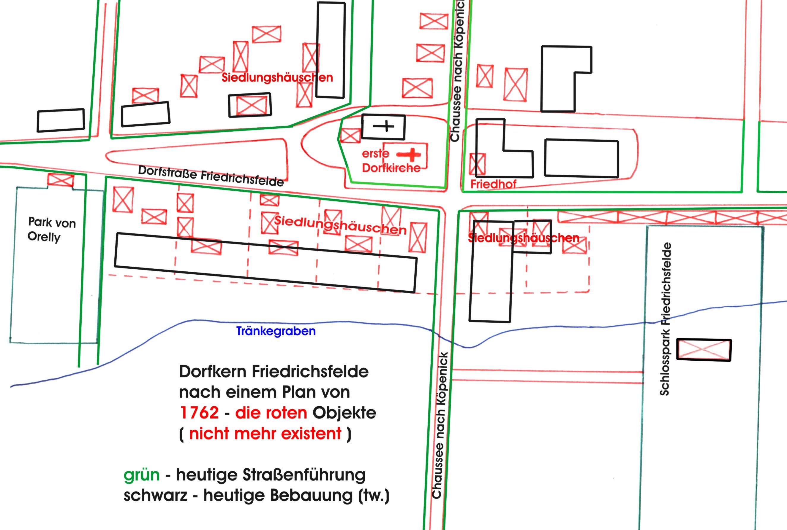 Lageplan des alten Friedrichsfelder Dorfangers im 18. Jahrhundert im Vergleich mit der Bebauung im 20. Jahrhundert